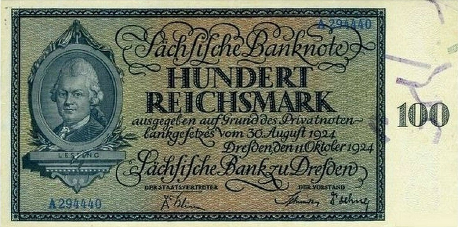 100 német márka